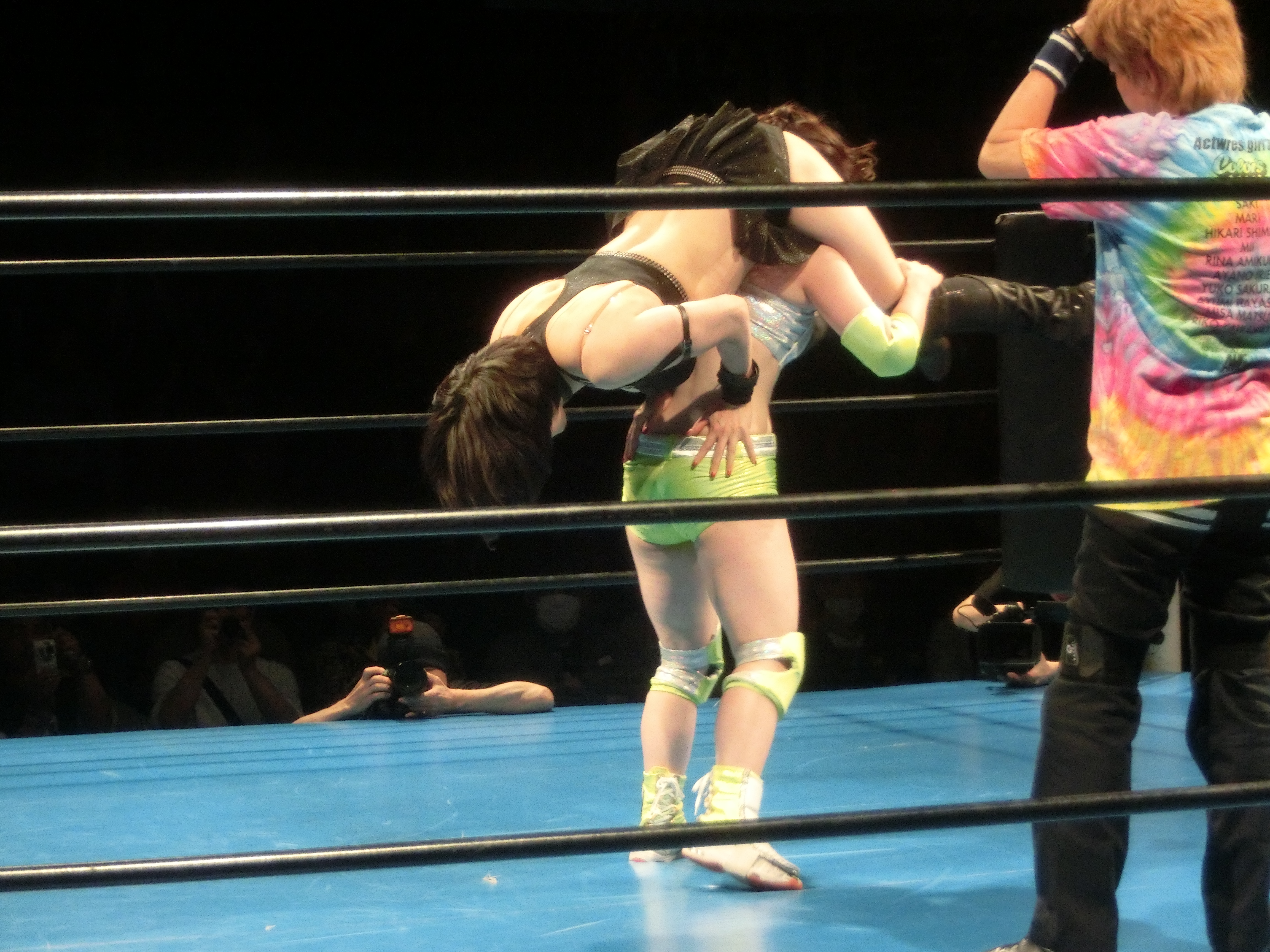 カラーズ新木場2019年5月